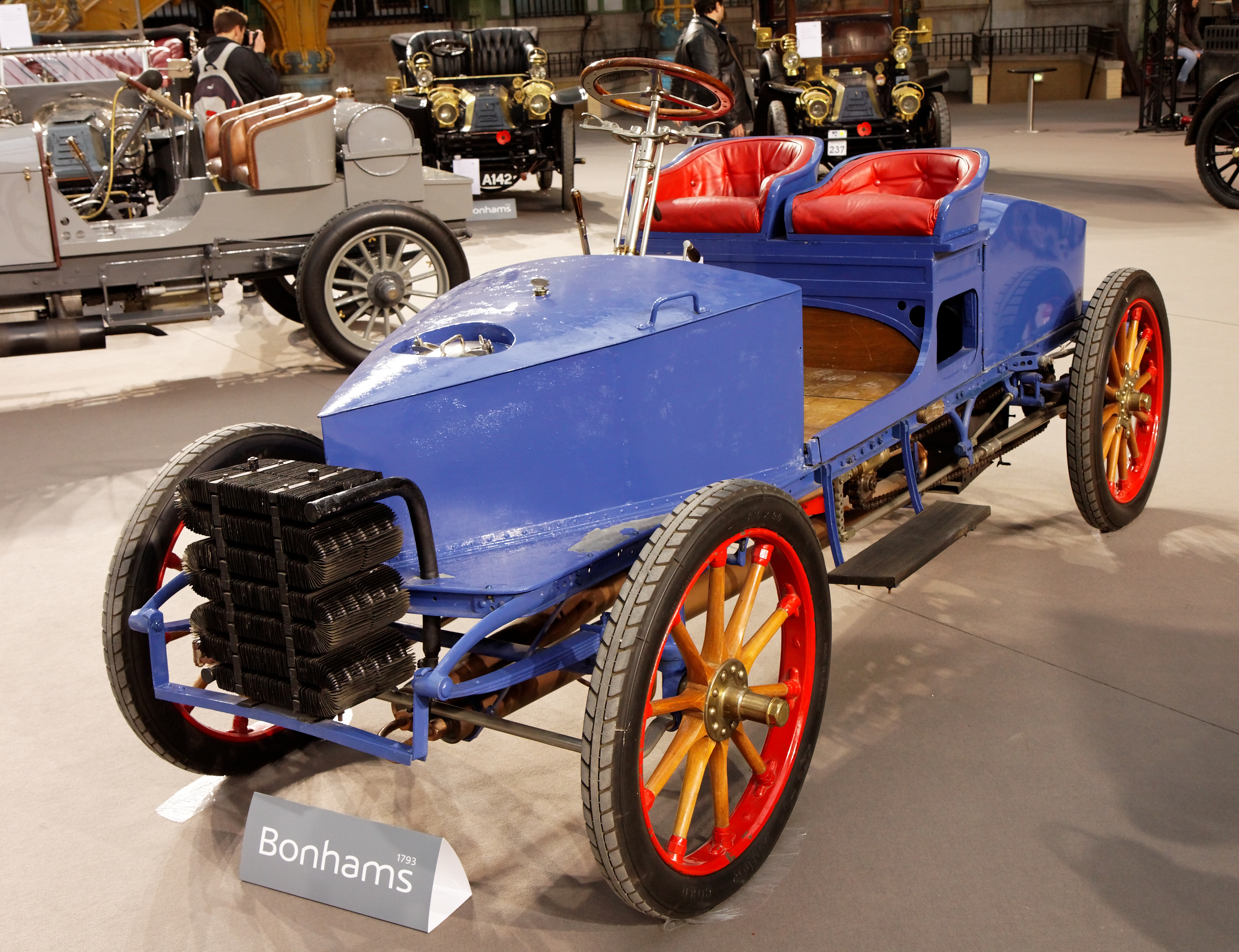 Gardner-Serpollet biplace de course